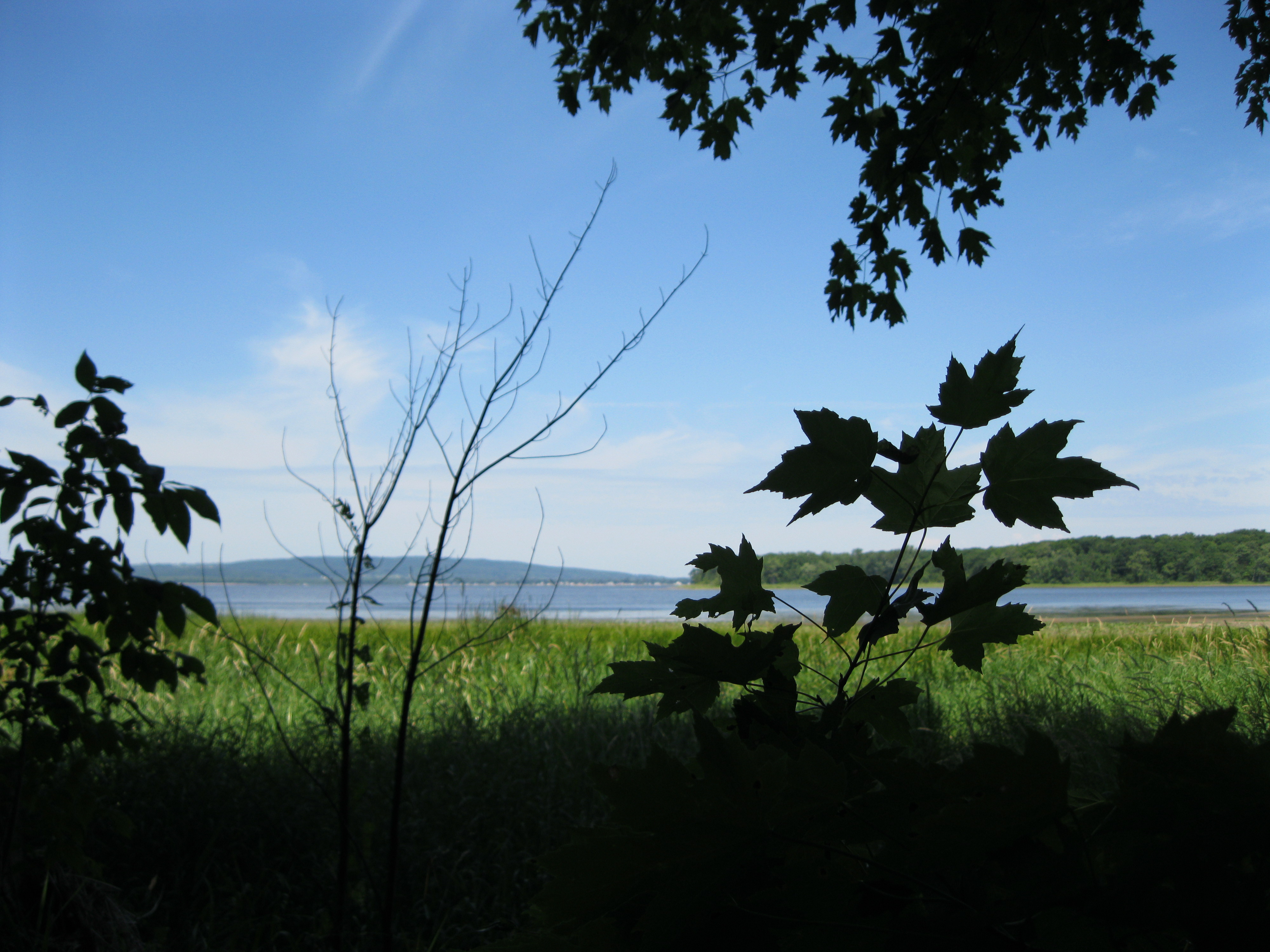 Le Lieu historique national du Canada de la Bataille-du-Lac-des-Deux-Montagnes est situé au nord du boulevard de Senneville, Senneville, un peu à l'ouest du chemin de l'Anse-à-l'Orme. La plaque qui avait été installée a été volée.